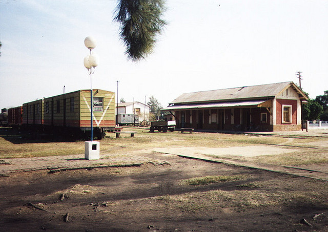 Estación Corzuela Ferrocarril General Manuel Belgrano (FCGB).